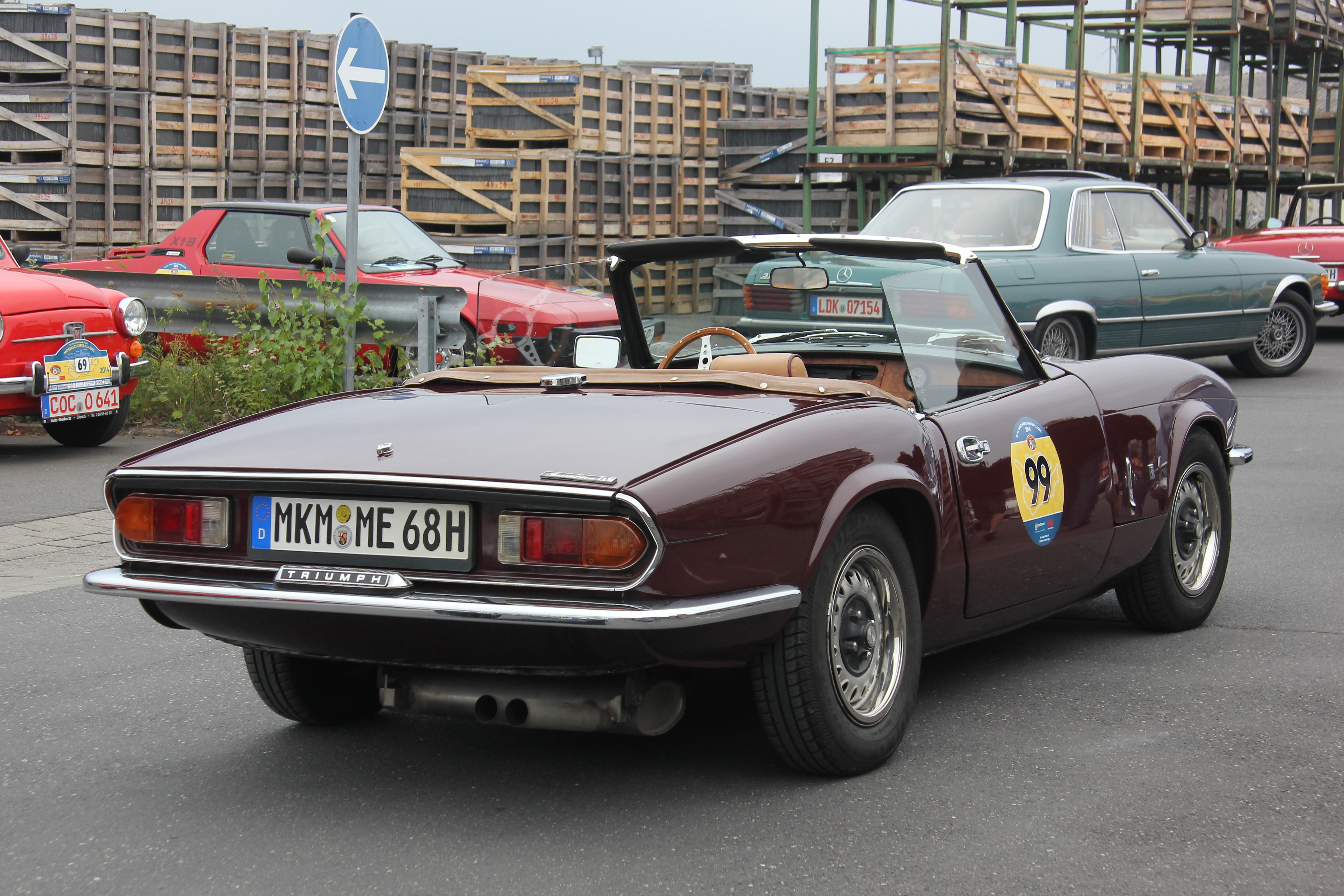 Triumph Spitfire 1500 Mk 4 (12/1974 bis 8/1980); Vierzylinder-Viertakt-Reihenmotor, 1493 cm³, 71 PS bei 5500/min, Vierganggetriebe, Höchstgeschwindigkeit 161 km/h (Kennzeichen des Fahrzeugs verändert)